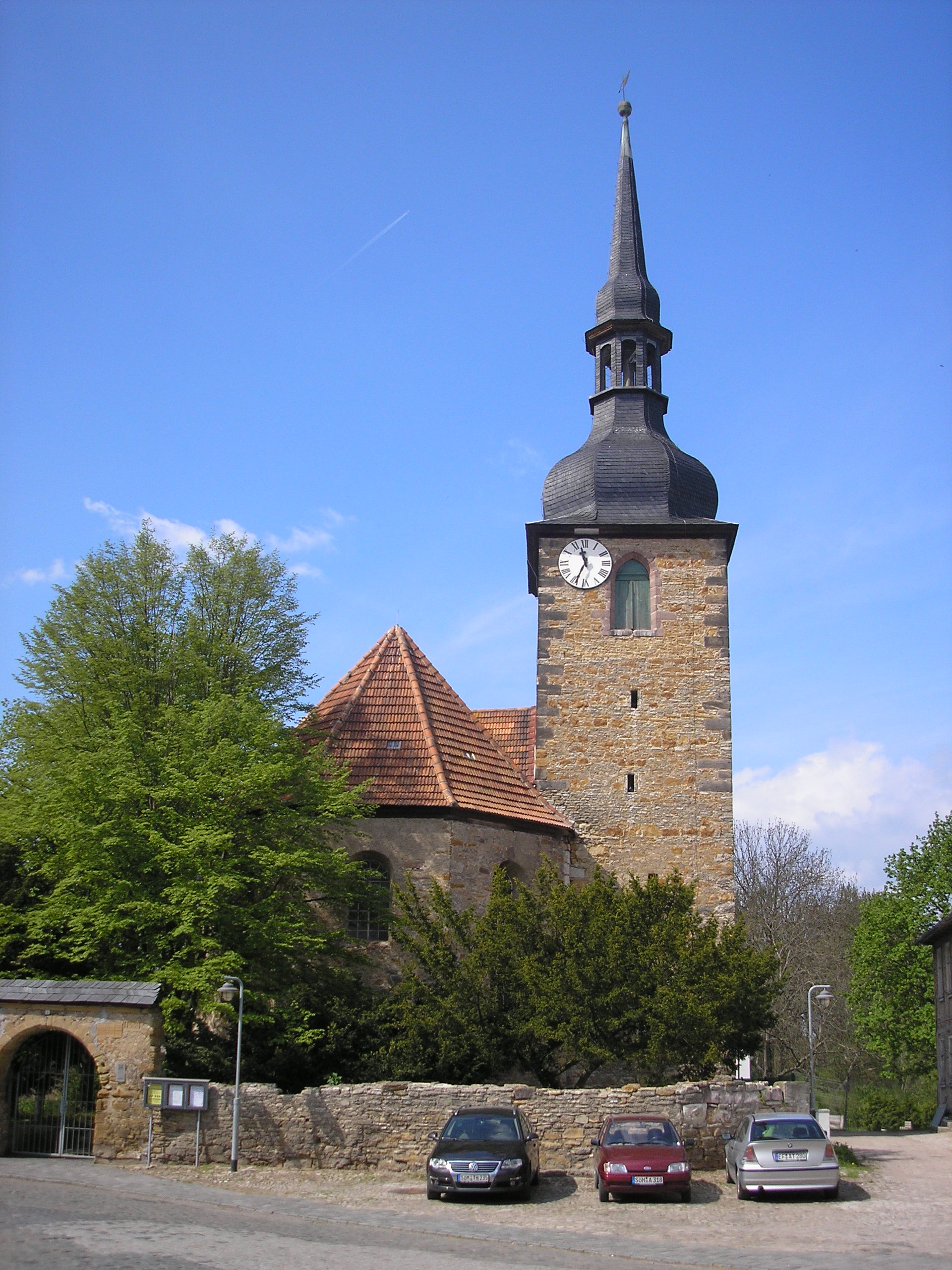 Die Petrikirche in Sömmerda (Thüringen).